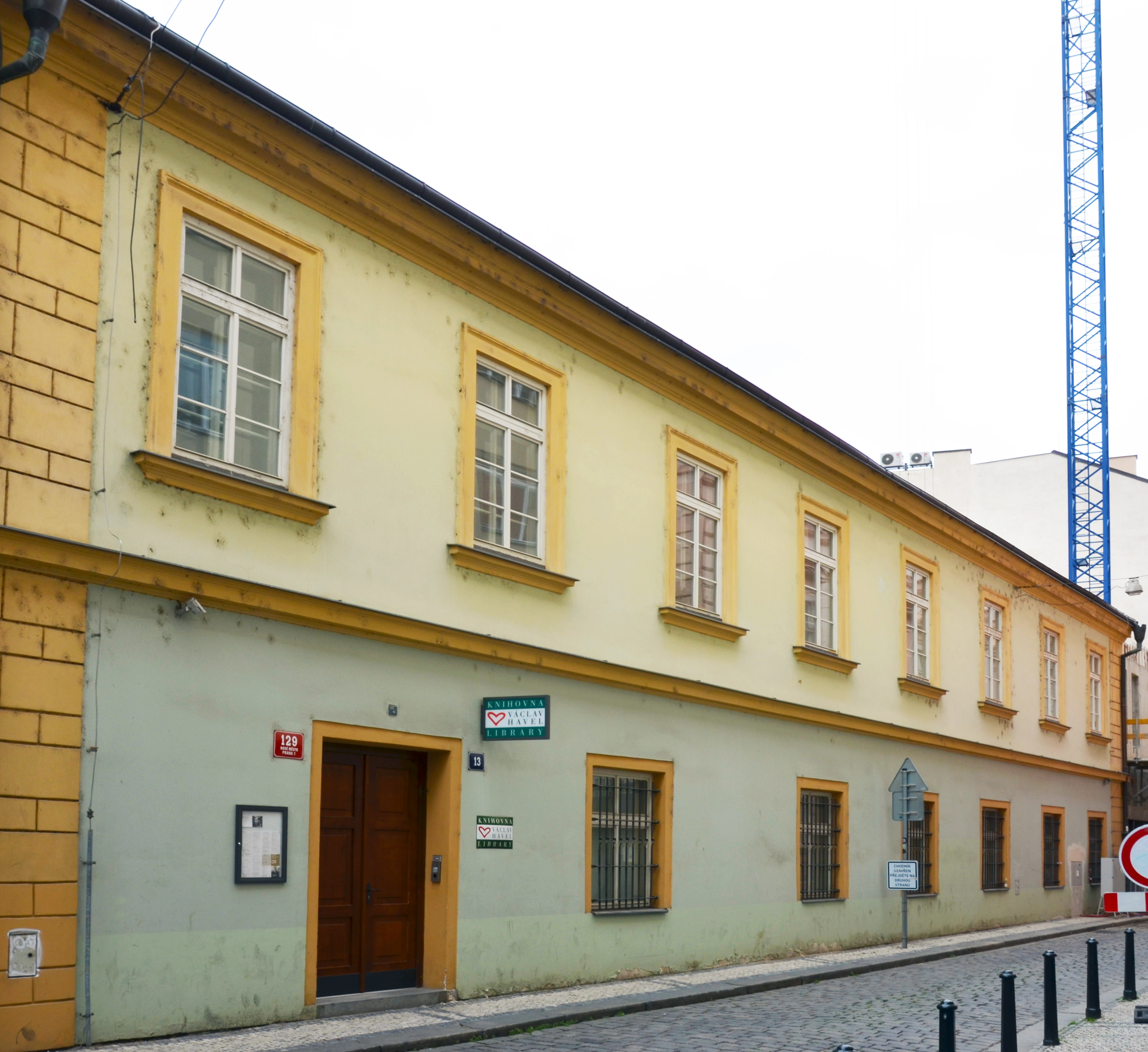 Knihovna Václava Havla, Ostrovní 13, Praha 1